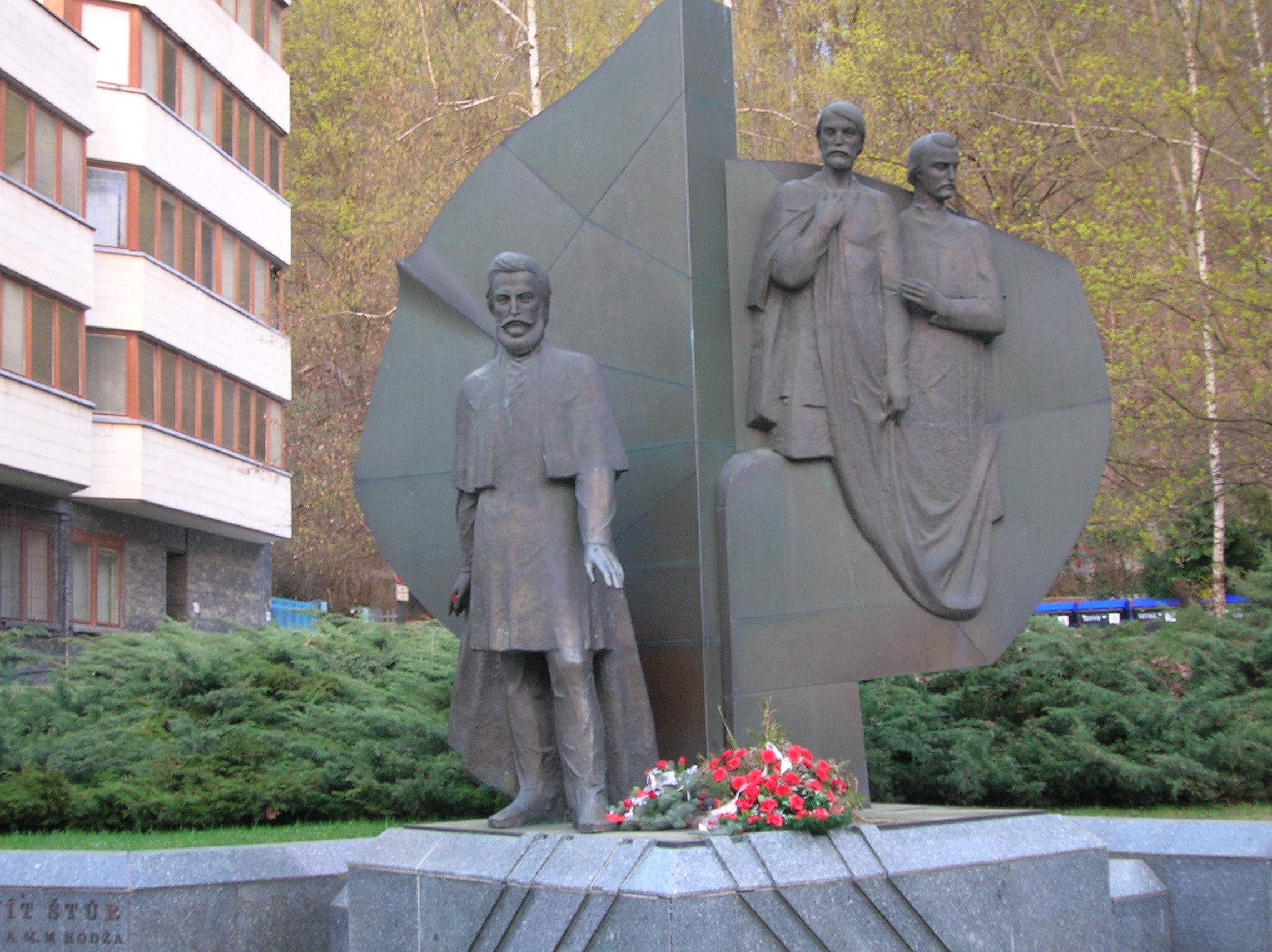 Pamätník národných buditeľov. Na mramorovom podstavci štylizovaný bronzový list lipy, z ktorého pravej polovice vystupujú postavy Hurbana a Hodžu. V popredí bronzová socha Ľudovíta Štúra v nadživotnej veľkosti. (28.09.1991; Akad. soch. Milan Ormandík, Ing. arch. Ivan Michalec, DrSc., Ing. arch. Miloslav Mojžiš), Trenčín, Hviezdoslavova ulica